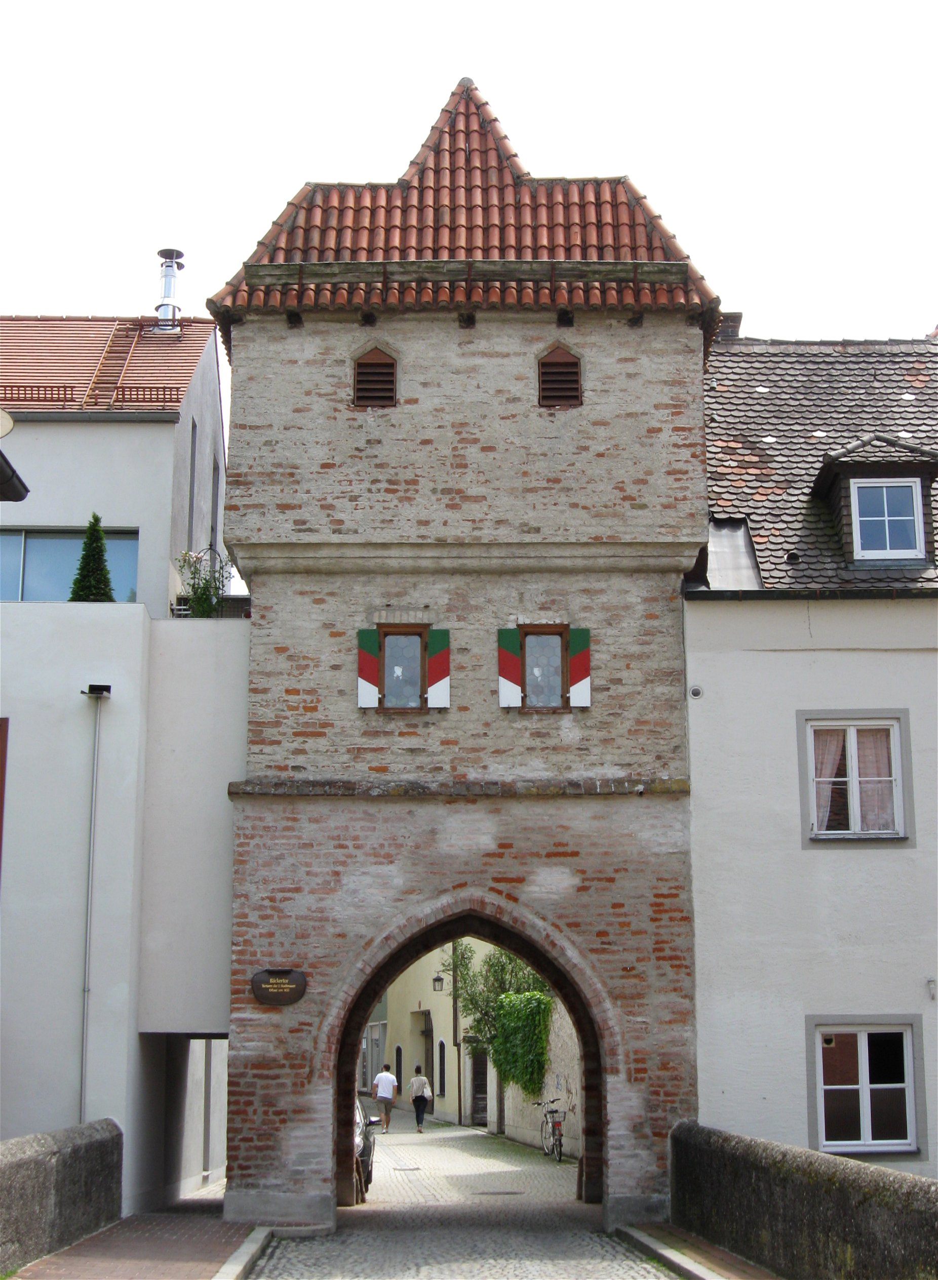 Hintere Mühlgasse 204; Bäckertor, ehemaliges Stadttor, sog. Bäckertor, über spitzbogiger Durchfahrt eingeschossiger Rohbacksteinbau mit Stufengiebel nach Osten und Walmdach nach Westen, dendrologisch datiert auf 1435, Ausbau als Wohnung 16. Jahrhundert; siehe Stadtbefestigung 15. Jahrhundert. D-1-81-130-144